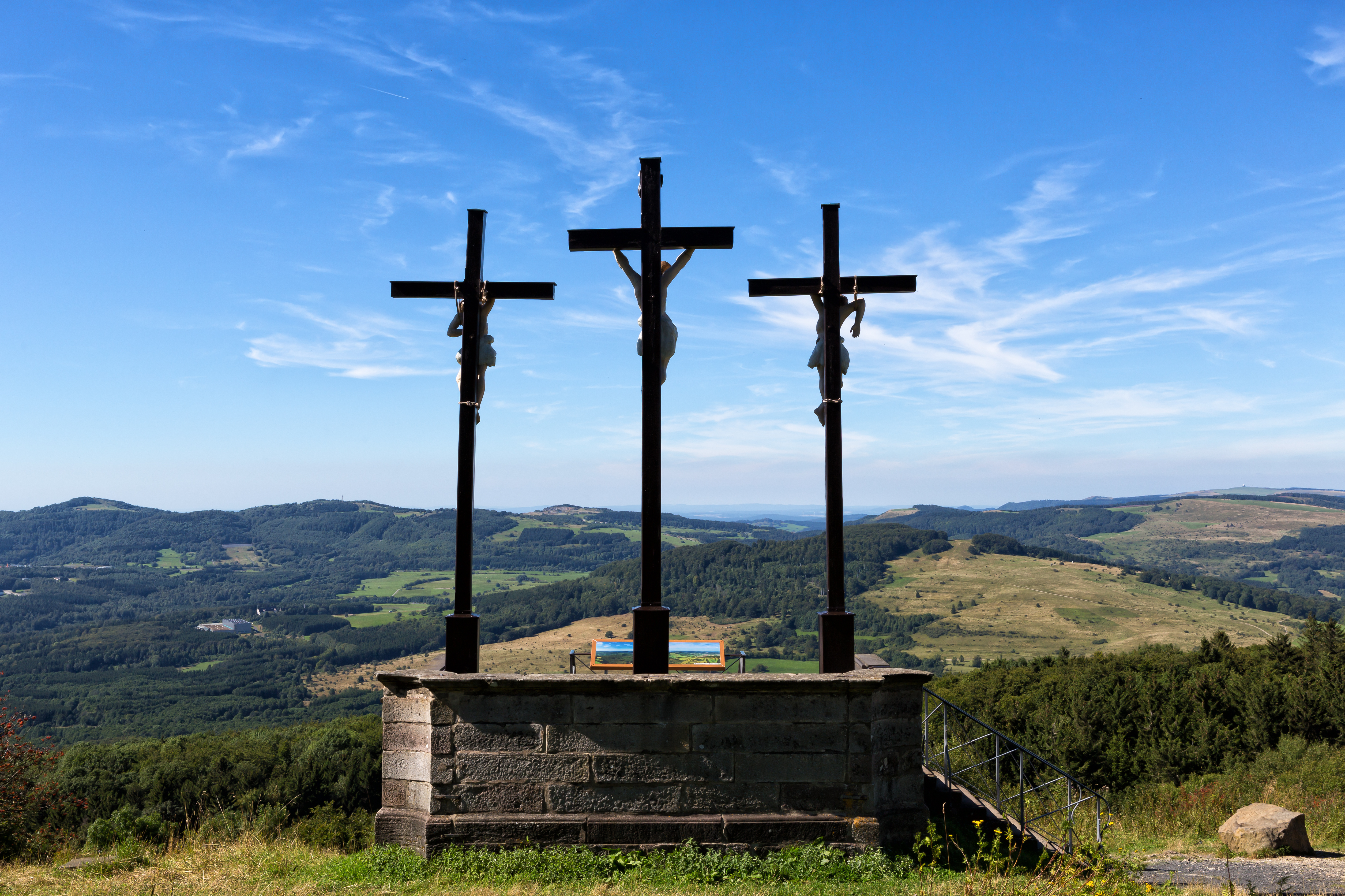 Kreuzberg (Rhön) - Golgota-Kreuze - 2016